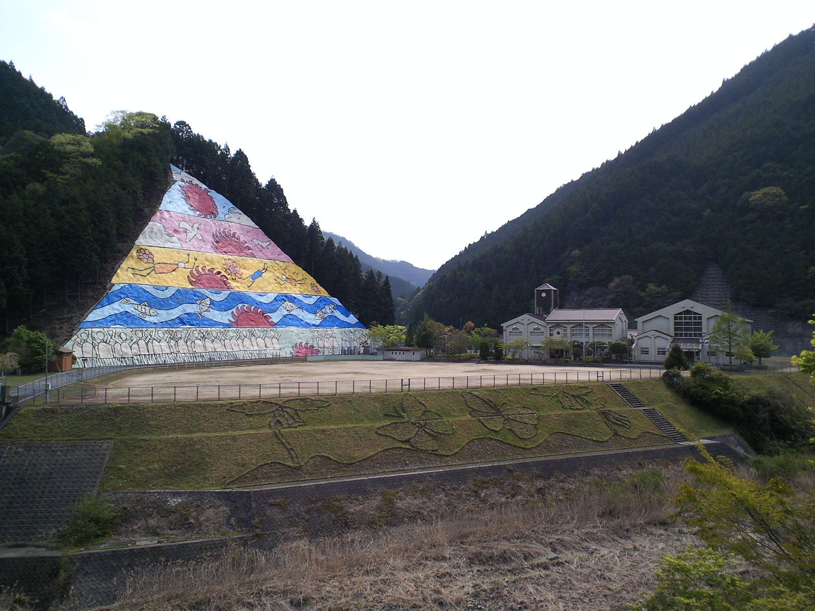 かつらぎ町立花園中学校 (和歌山県伊都郡かつらぎ町)